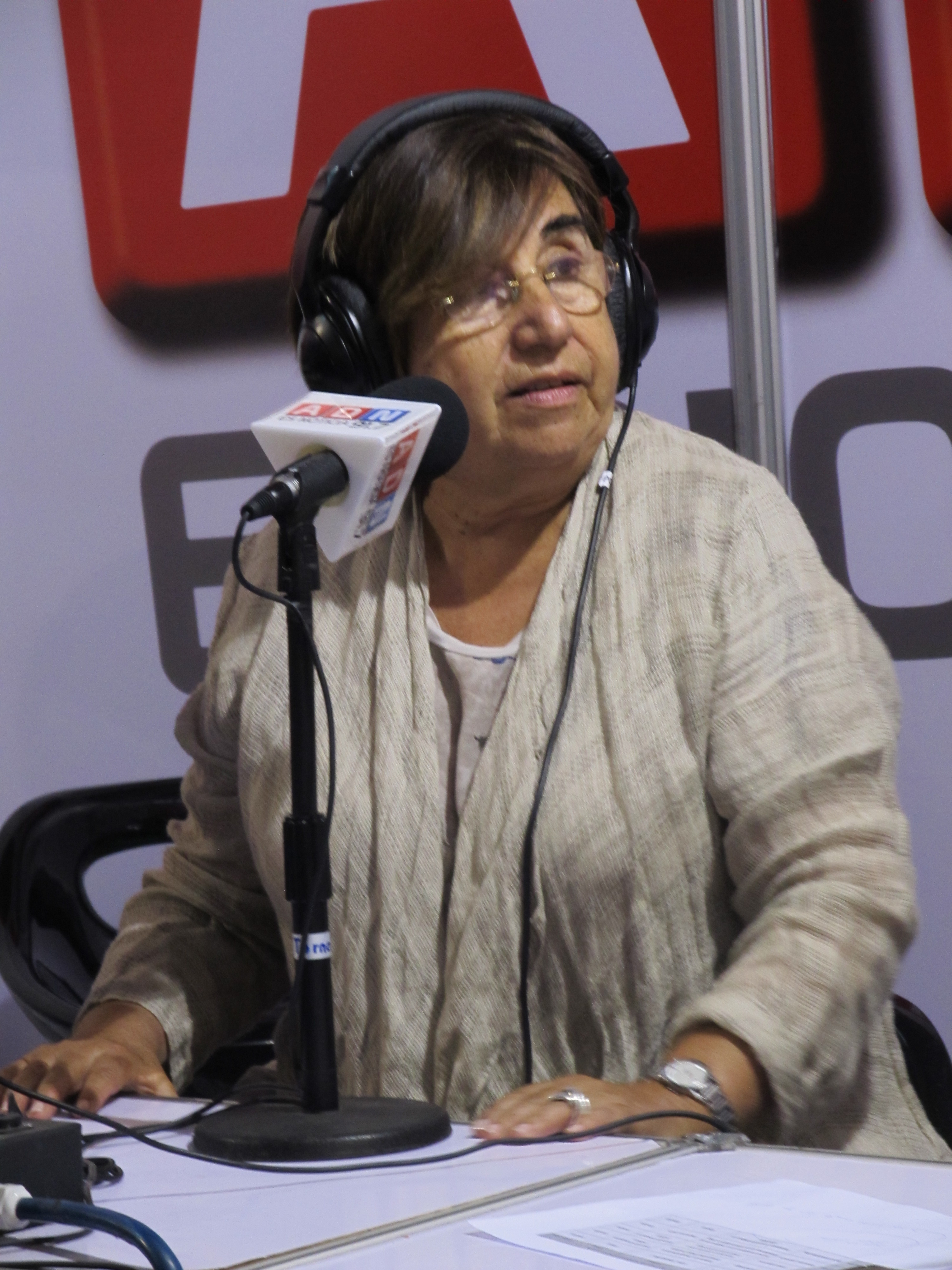 María Antonieta Saa, política chilena, en FILSA 2014.